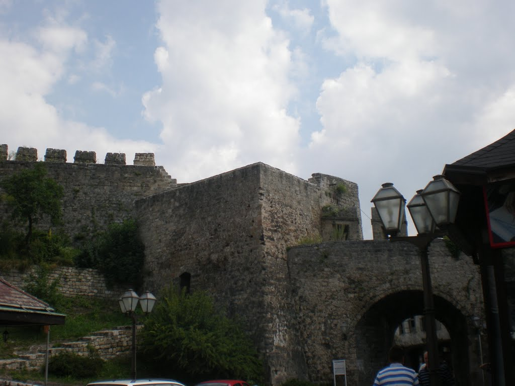 Tvrđava u Jajcu.